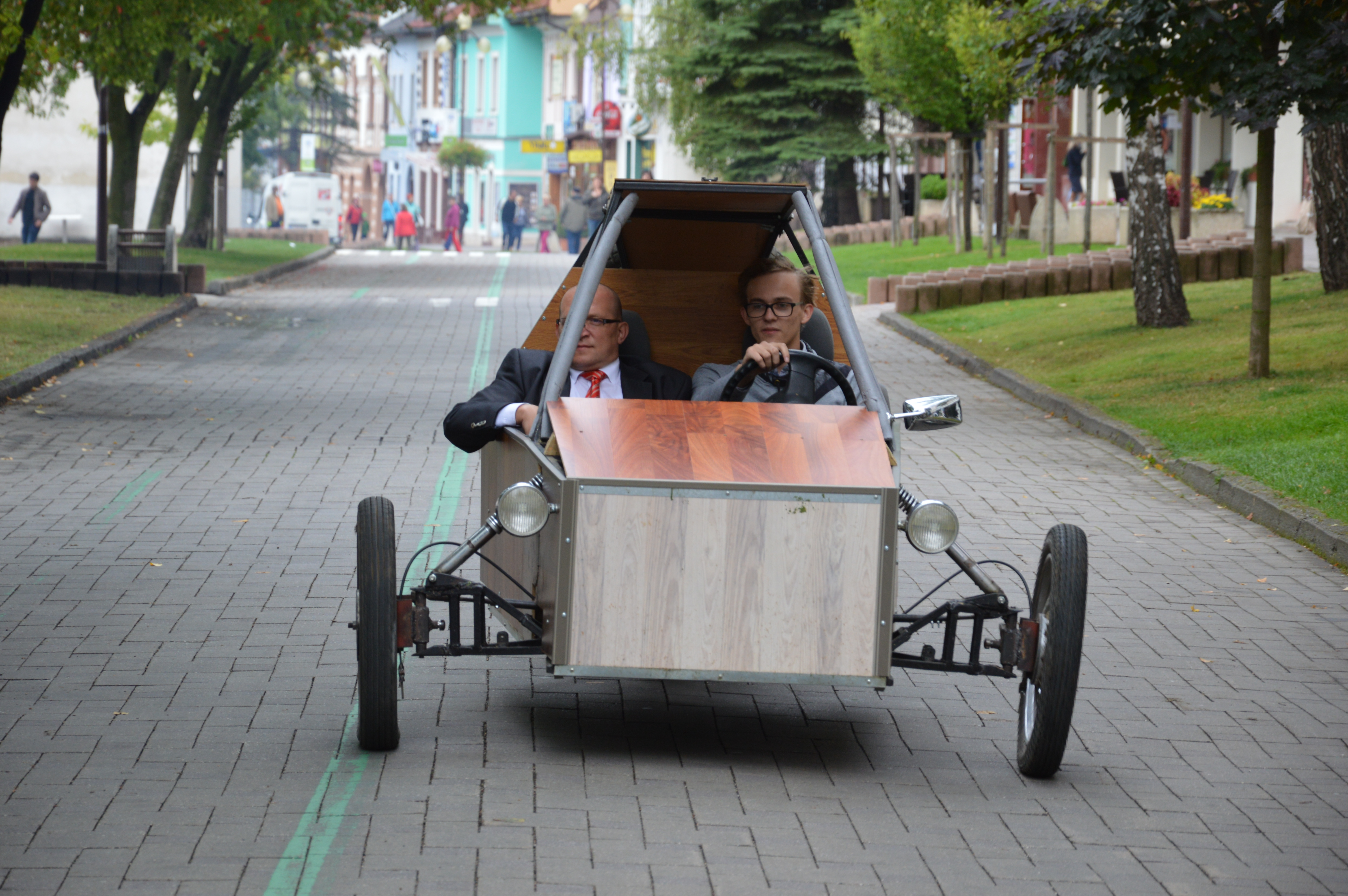 V študentskom aute jeho autor na festivale Be Active previezol primátora mesta Poprad, Jozefa Švagerka.